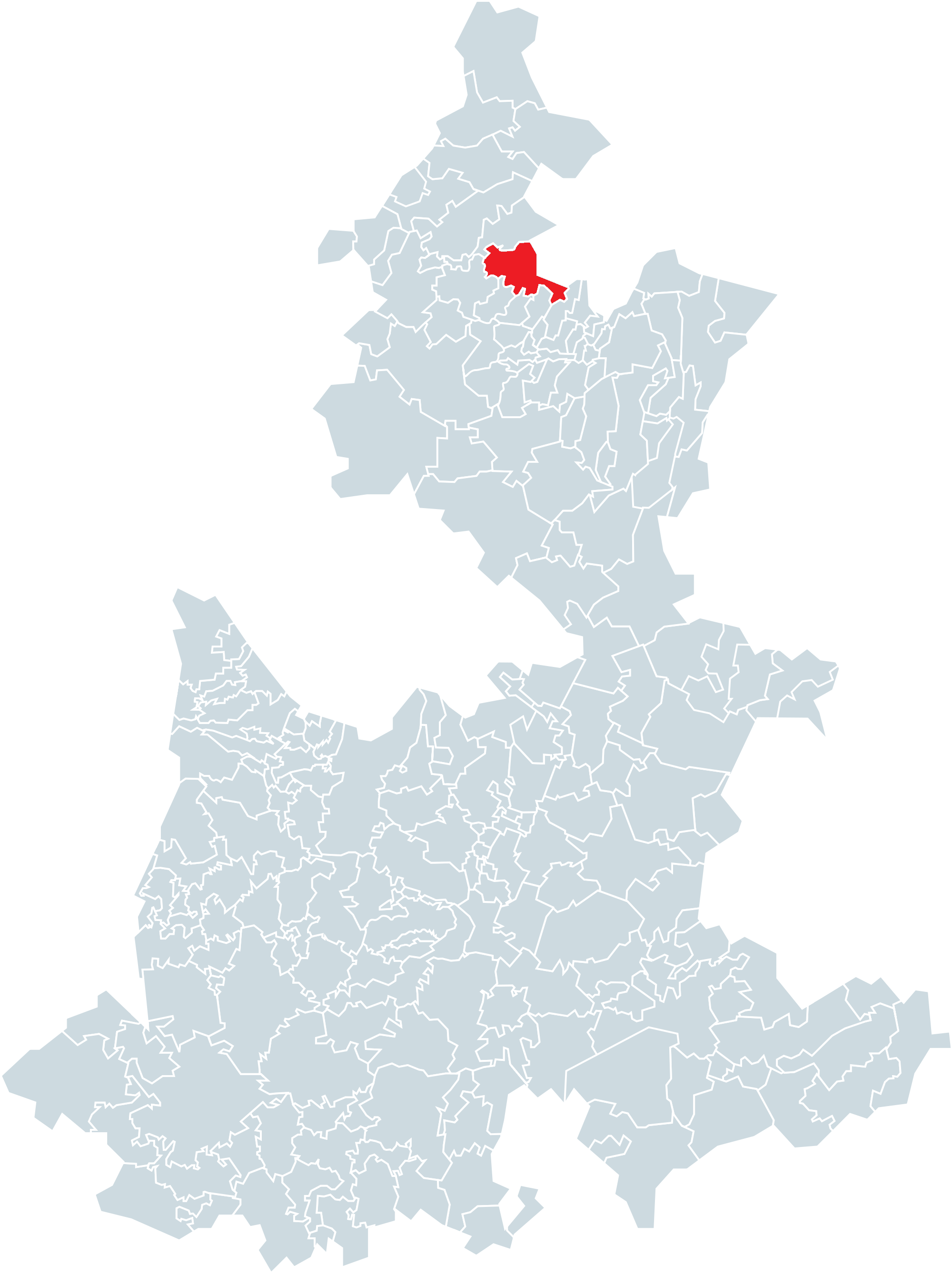 Municipio de Jopala